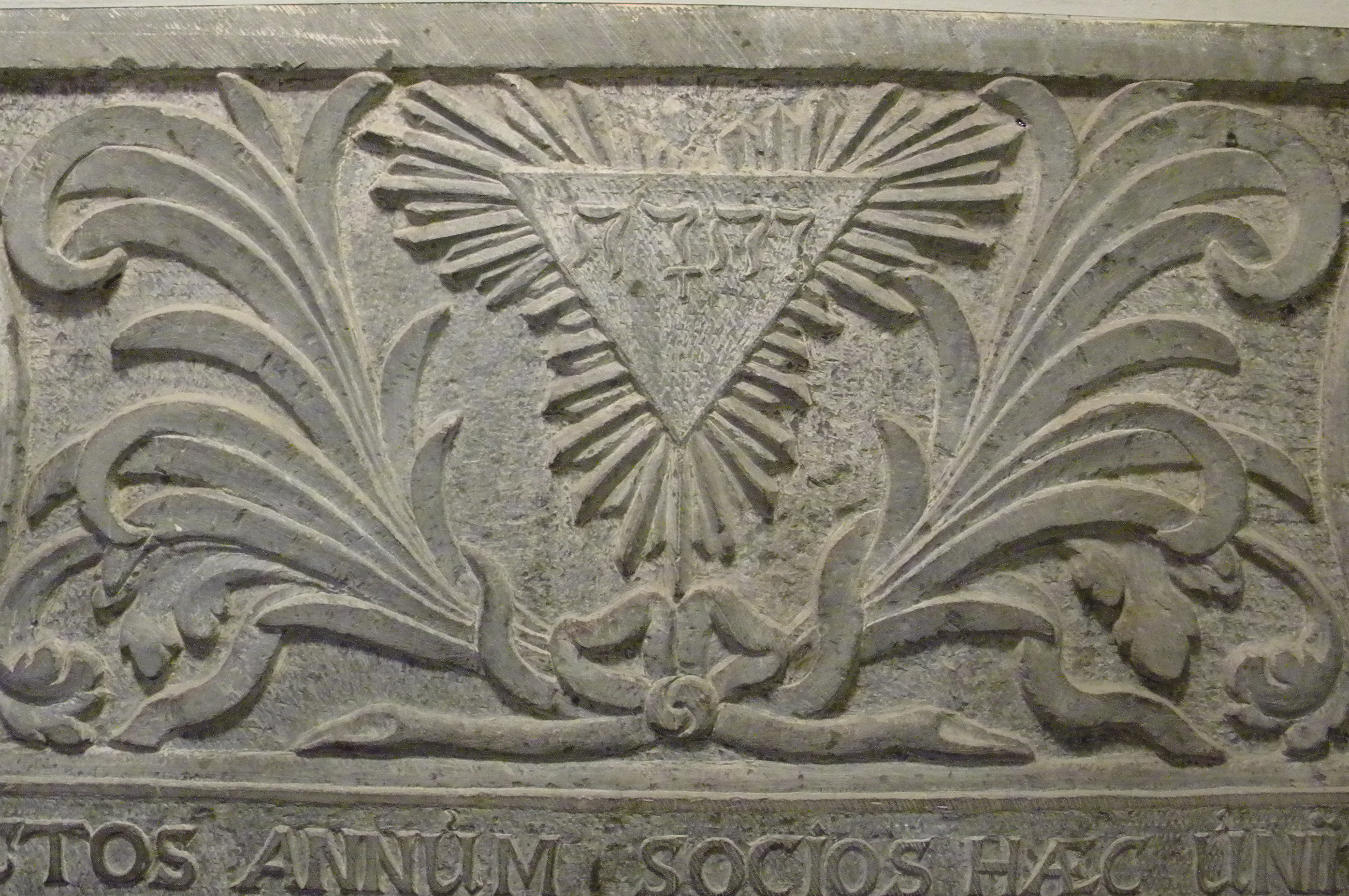 Gravsten med tetragrammet JHWH i Sofia Albertina kyrka, Landskrona